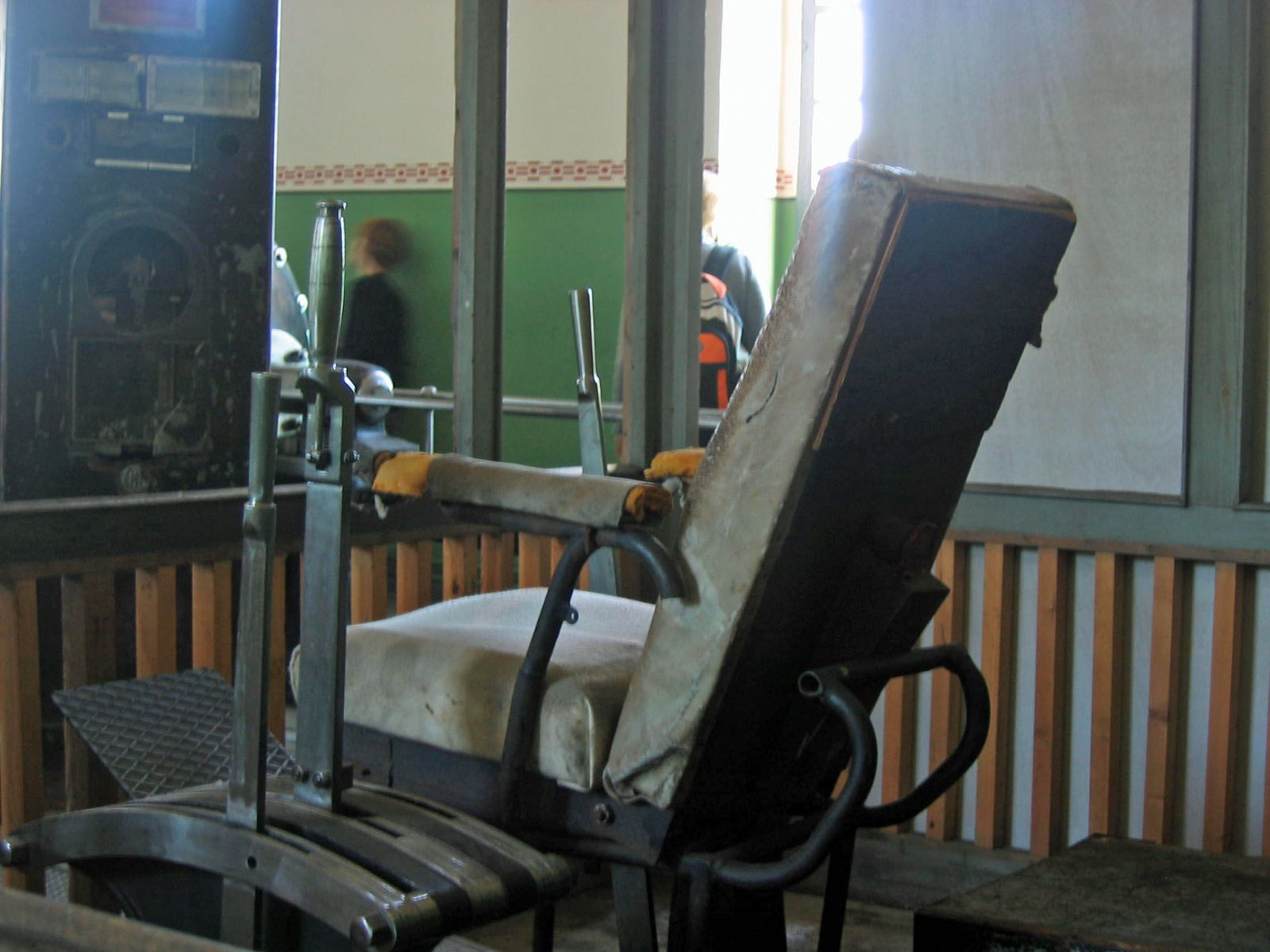 Arbeitsplatz des Fördermaschinisten Zeche Hannover eigenes Foto